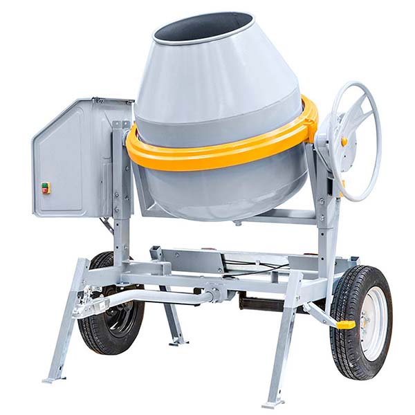 Hormigonera remolcable modelo BPR-400T fabricada por la empresa Umacon en España.